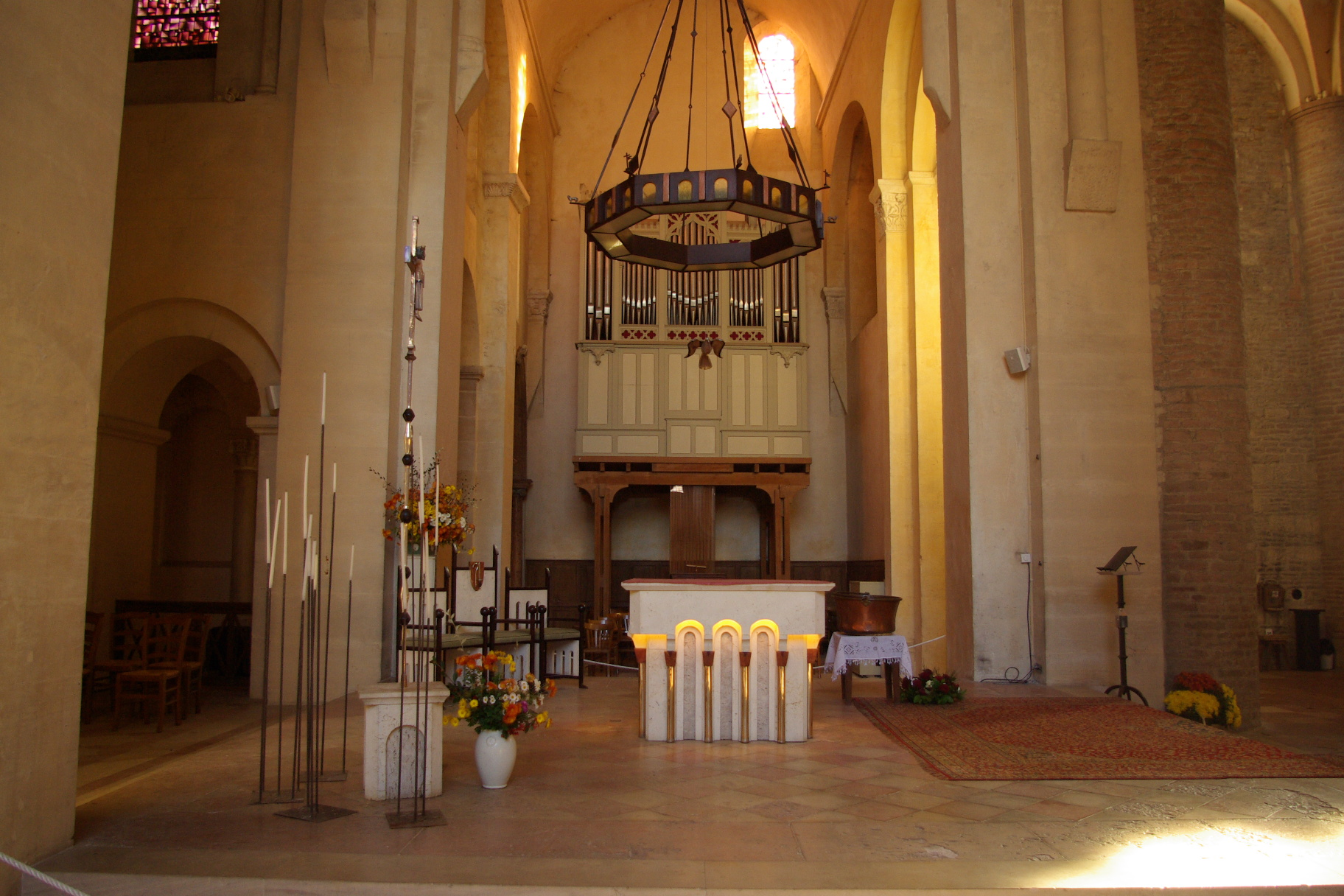 Croisée du transept de l'Abbaye Saint-Philibert de Tournus